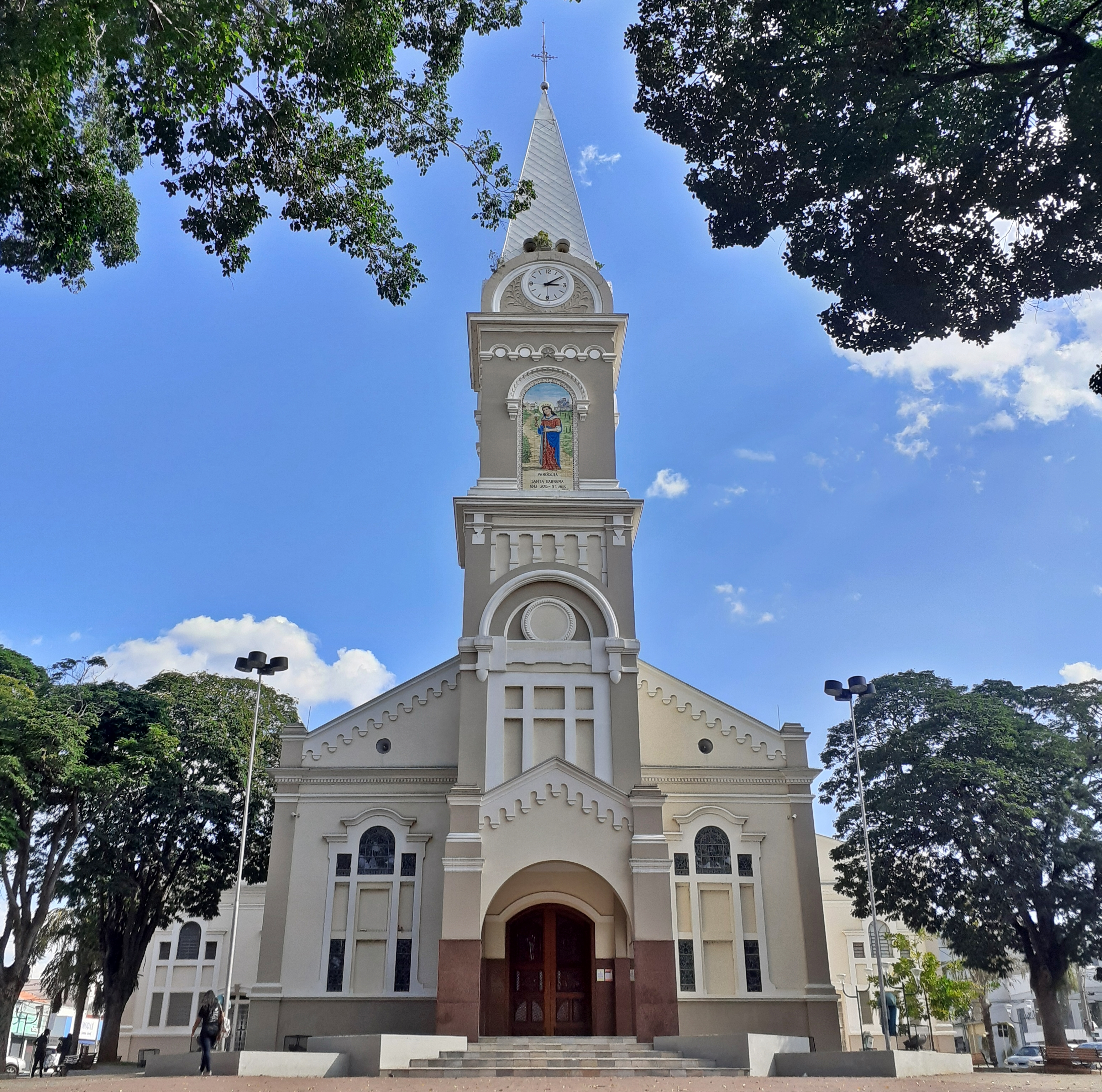 Igreja Matriz de Santa Bárbara d'Oeste